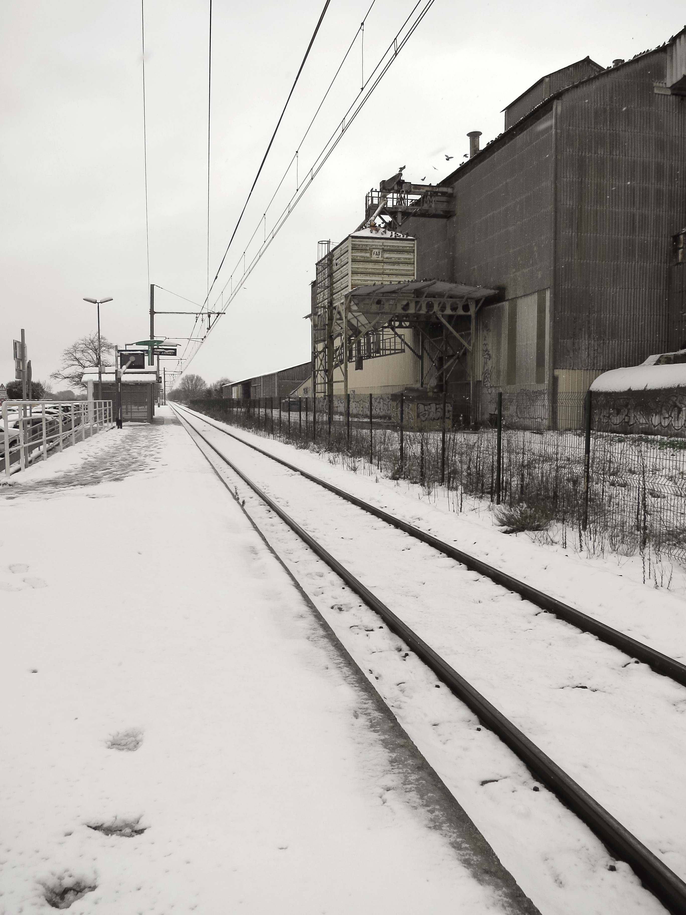 Pins-Justaret (Haute-Garonne, Midi-Pyrénées, France) - Gare de Pins-Justaret.